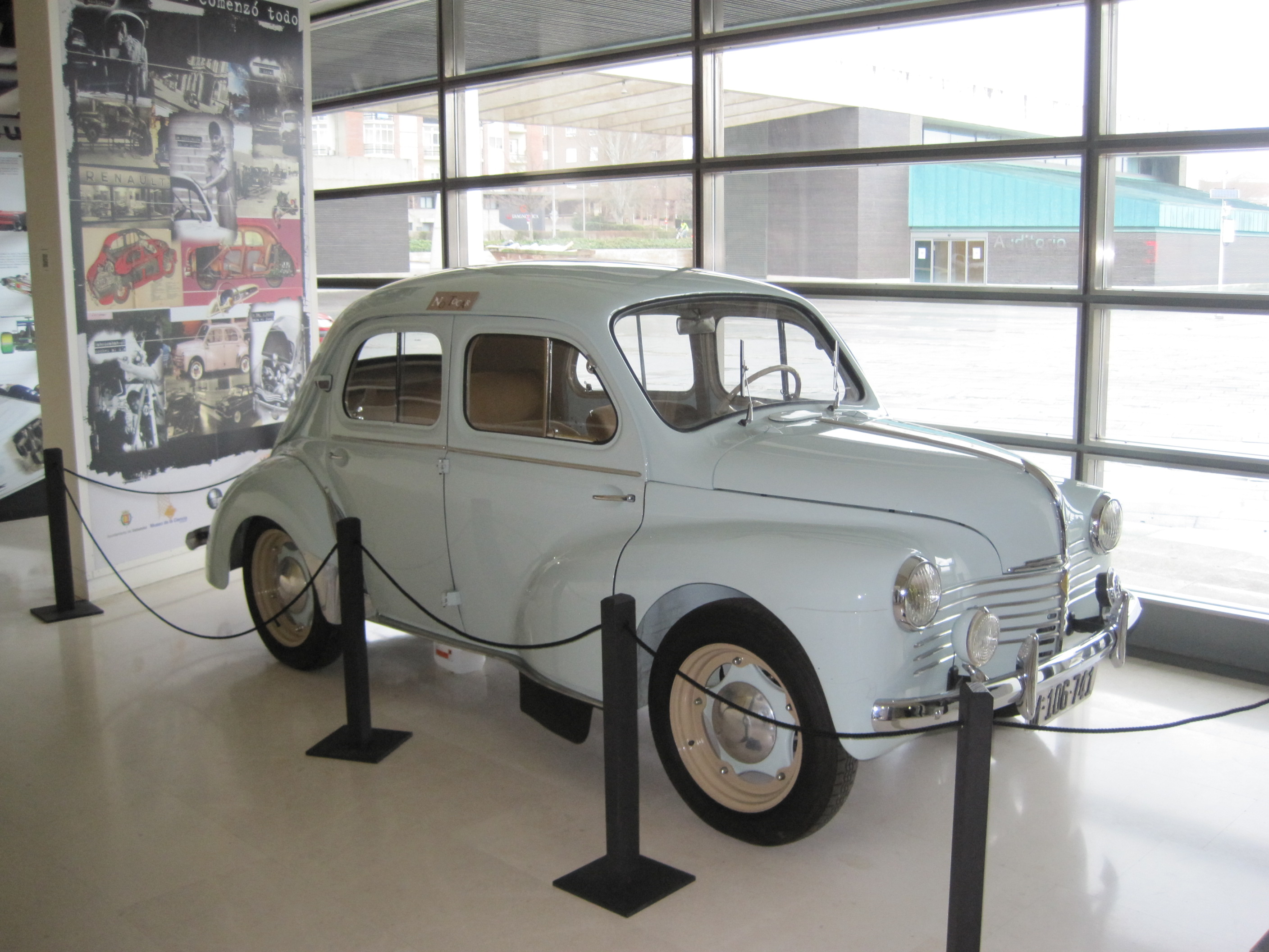 Renault 4 CV expuesto en el Museo de la Ciencia de Valladolid (España).